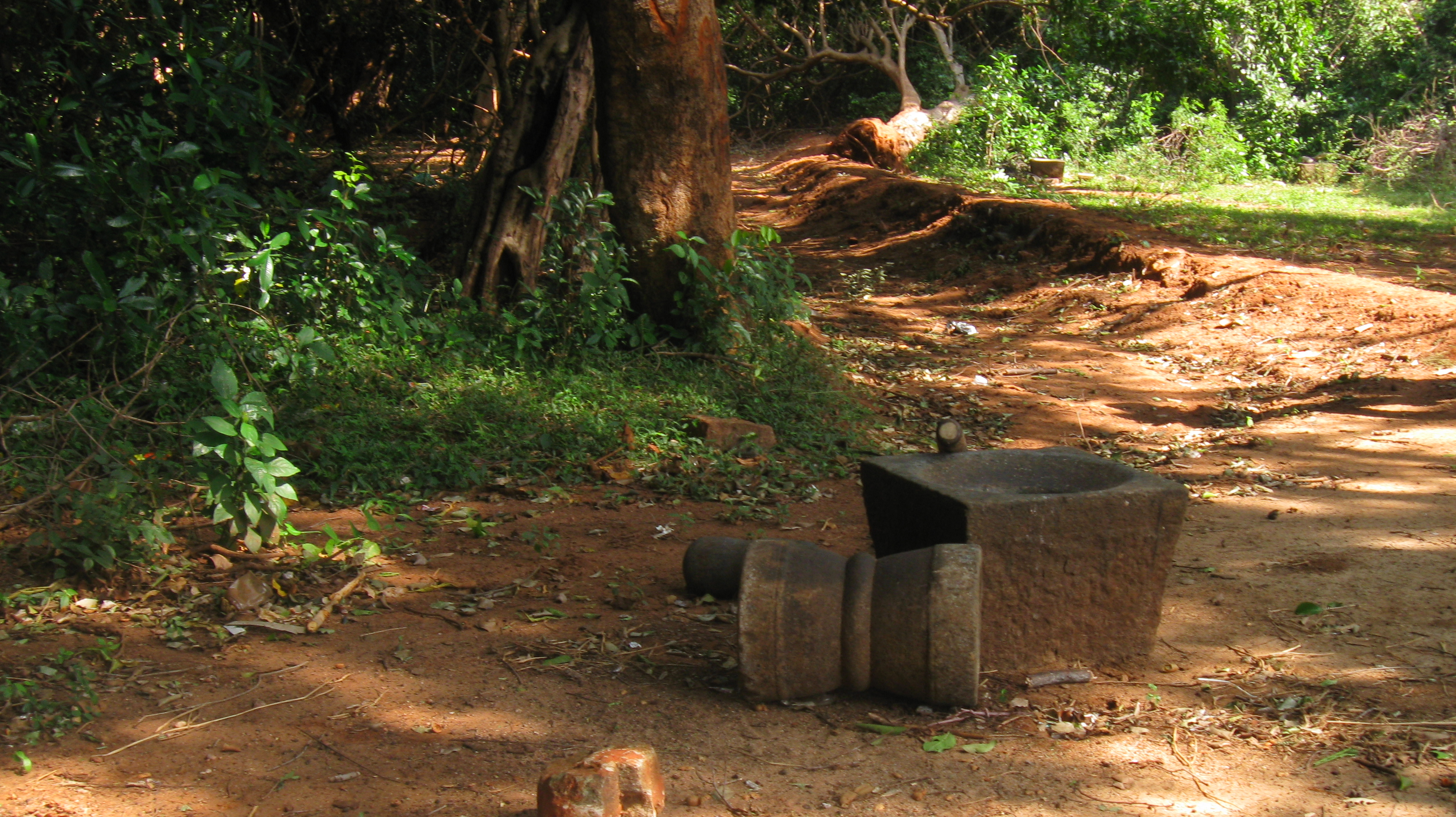 அறிவியல் யுகத்தில் பல புதிய மாற்றங்கள் நிகழ்ந்து விட்ட போதும் காட்டுக்கோயில்களில் தமிழர்கள் பயன்படுத்தும் பழம் பொருட்கள் இன்னும் காட்சிப் பொருள்களாகவேனும் காணக் கிடைக்கின்றன. தாகத்திற்குப் பானகம் தயாரிக்கவும், சமையலுக்கு நெல் குத்தவும் பயன்படும் உரலும் உலக்கையும் இப்படத்தில் காட்சி தருகின்றன.